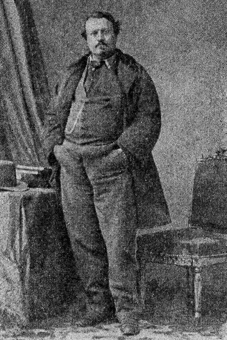 Portrait du chansonnier et goguettier parisien Joseph Darcier (1819-1883).